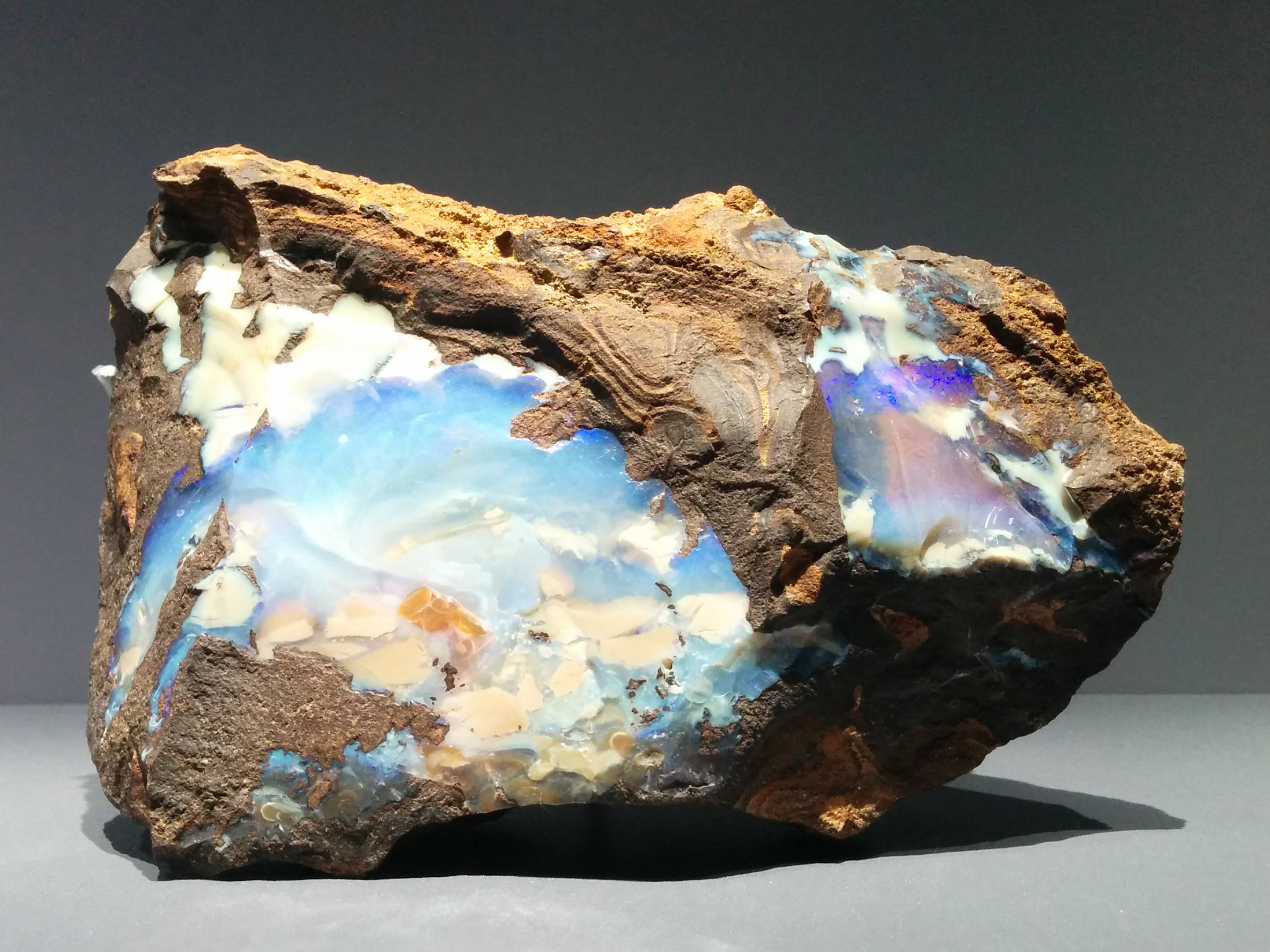 Opale d'Australie, à la Galerie de Minéralogie de Paris.